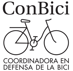 Logo de ConBici